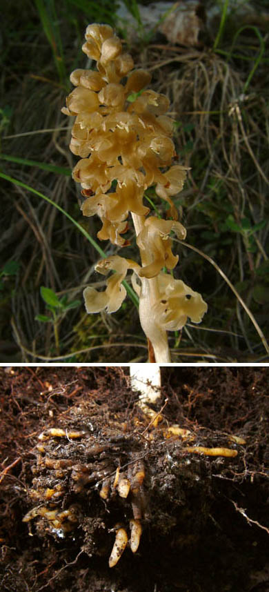 Vogelnestwurz. Neottia nidus-avis